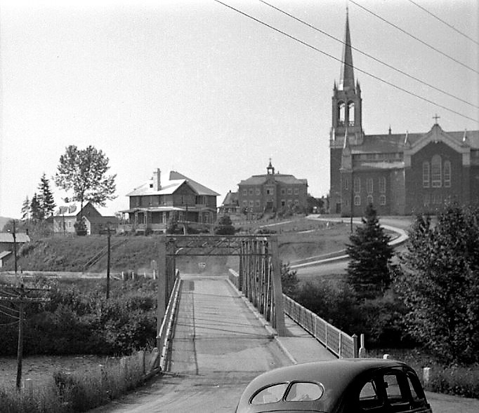 L'église, le couvent, le presbytère et la rivière à Causapscal